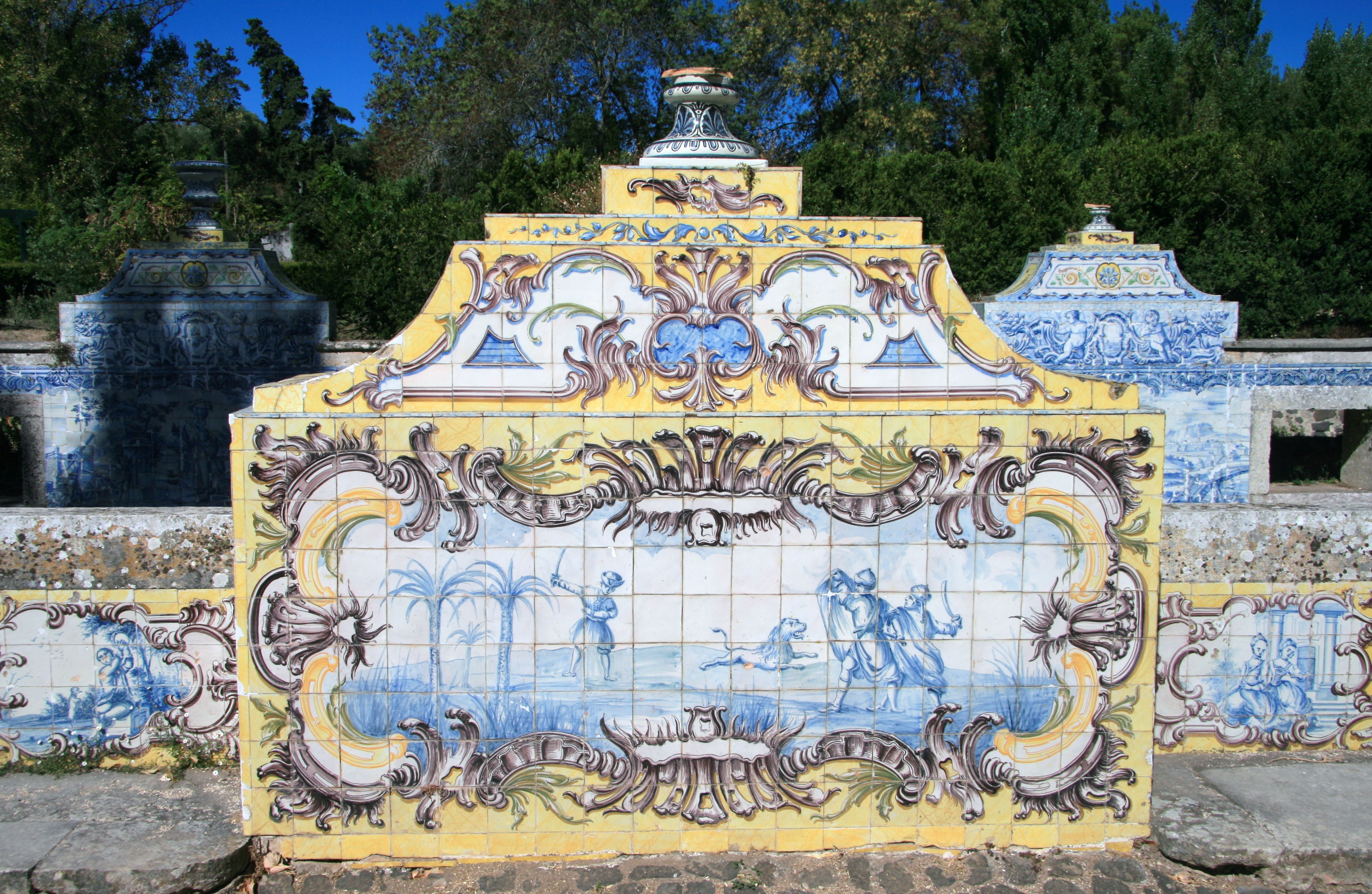 Канал Азулежу в саду Национального дворца Келуш, Португалия.